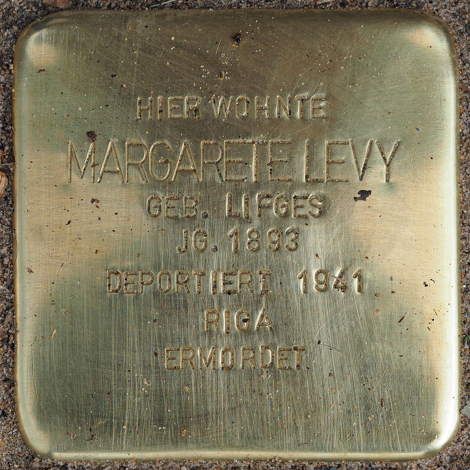 Stolpersteine Suechteln: Levy, Margarete